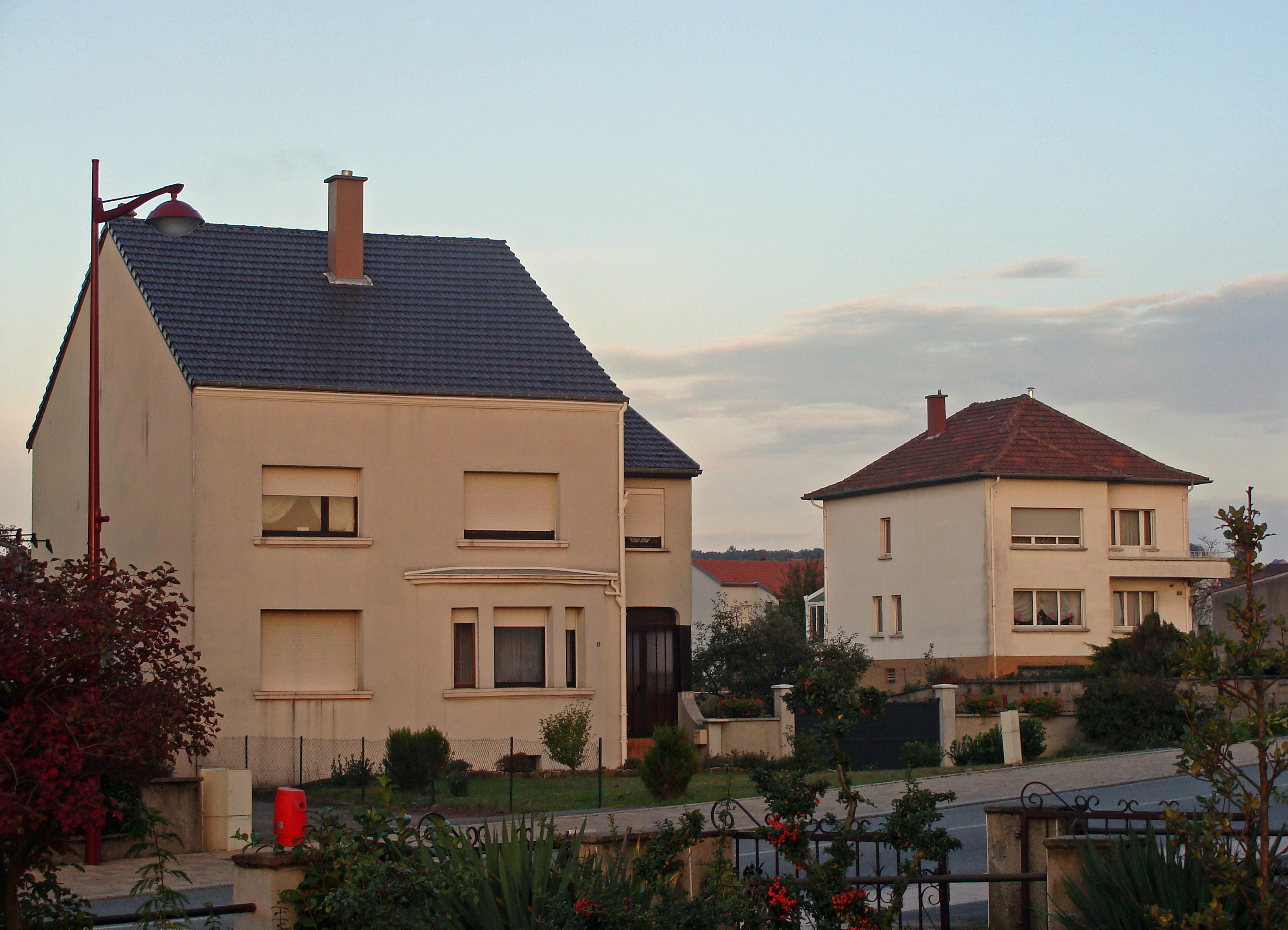 Quartier Ziegelstücker à L'Hôpital (Moselle), octobre 2013.